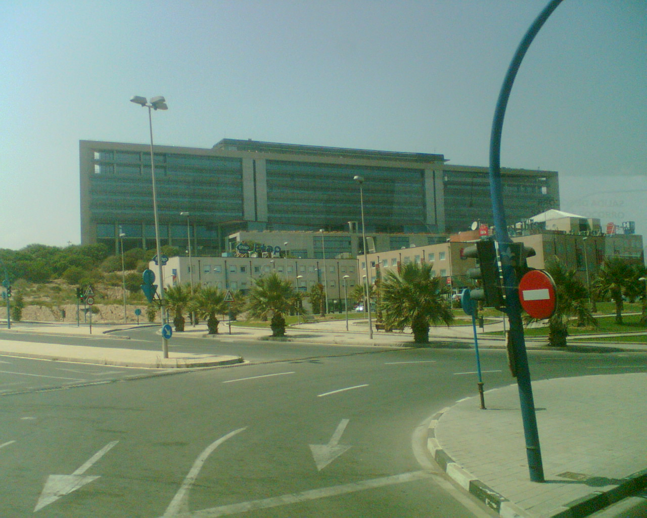 Sede de la OAMI (es); OHMI (fr); HABM (de); OHIM (en); UAMI (it)